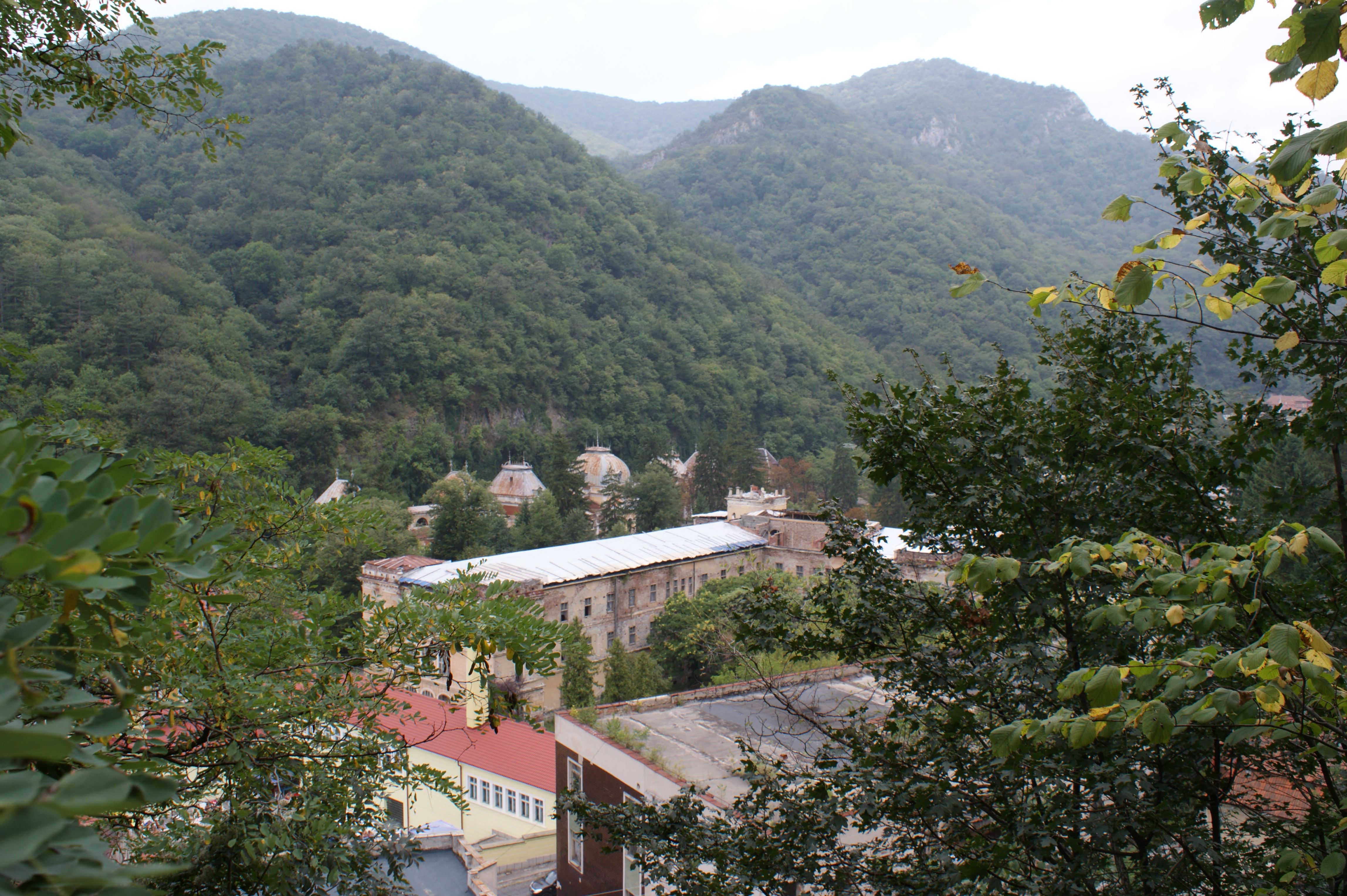 Ansamblul de arhitectură balneară II